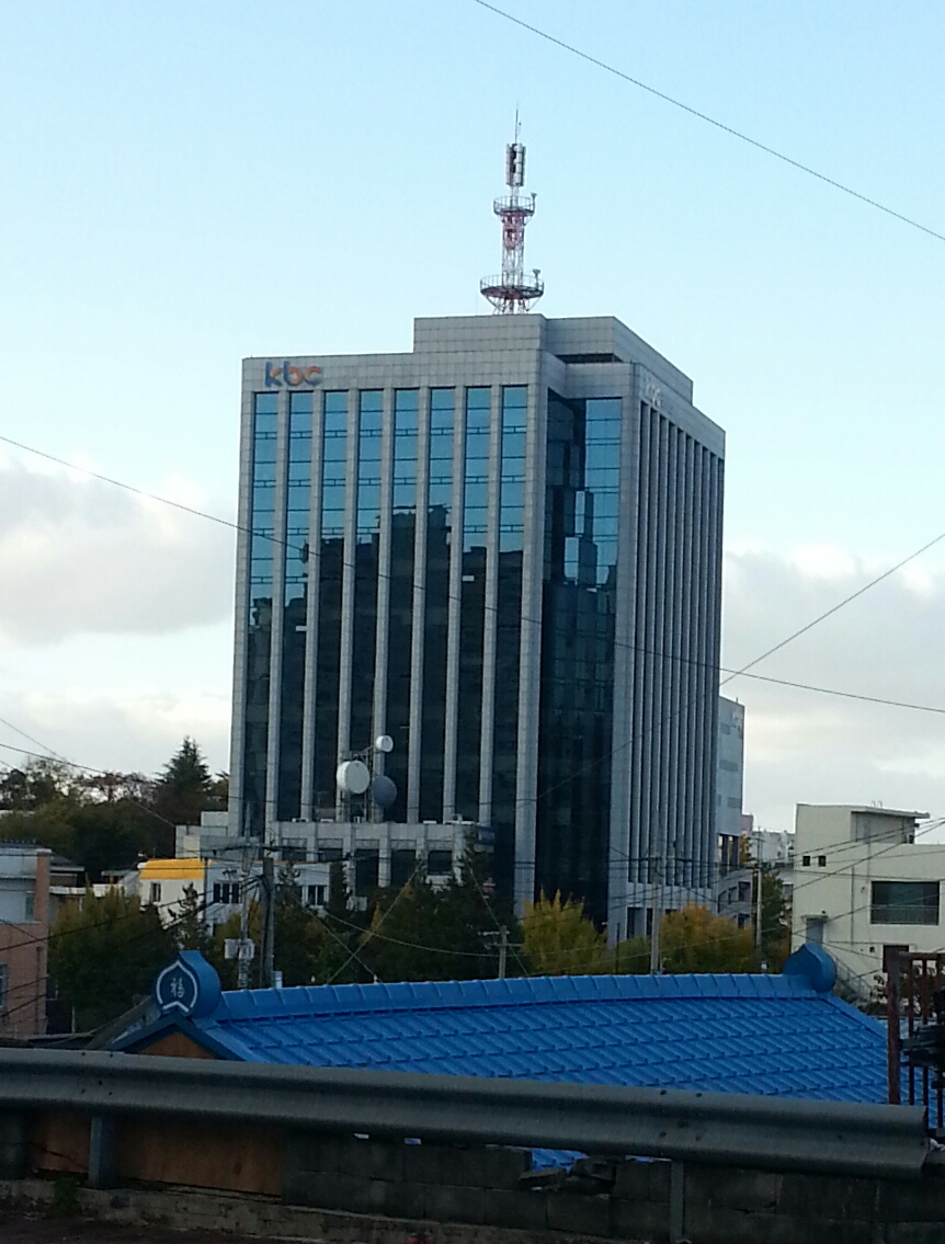 광주 kbc의 사진